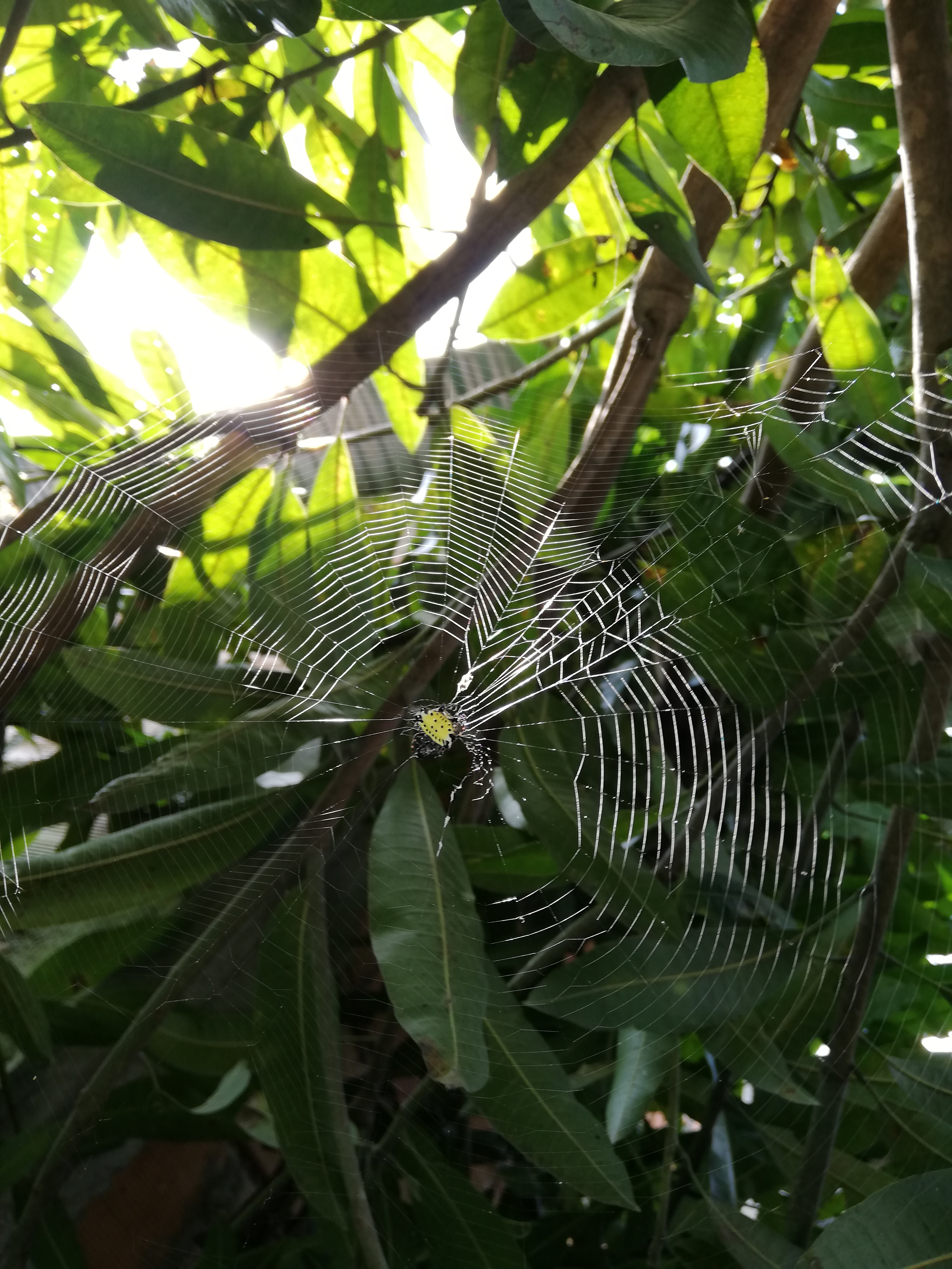 Telaraña de la araña panadera (Gasteracantha cancriformis), a la sombra de un árbol mangifera, en zonas rurales de Ibagué, Colombia.